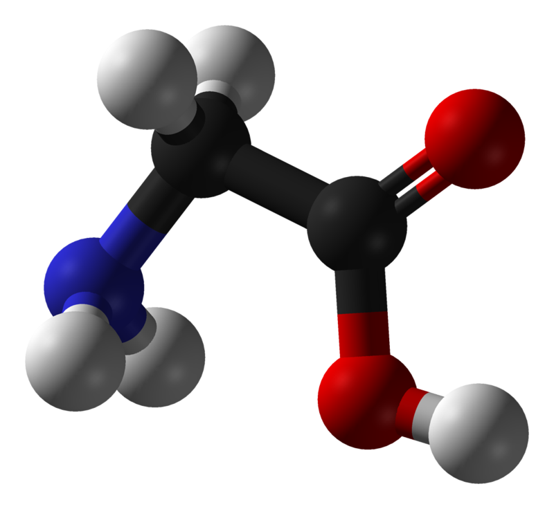 Aminosirkə 3D